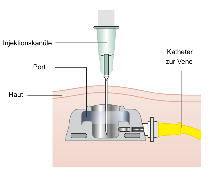 Portkatheter